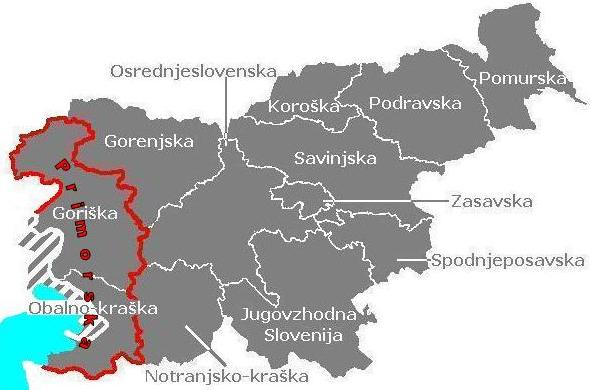 Trattasi di rielaborazione del File:Statistical regions of Slovenia English.PNG CRE inserita in wikimedia commons da utente Doremo il 2 dic 2012 utilizzata in voce en.wiki: Statistical regions of Slovenia che ha lo scopo di raffigurare l'area geografica denominata in lingua slovena Primorska